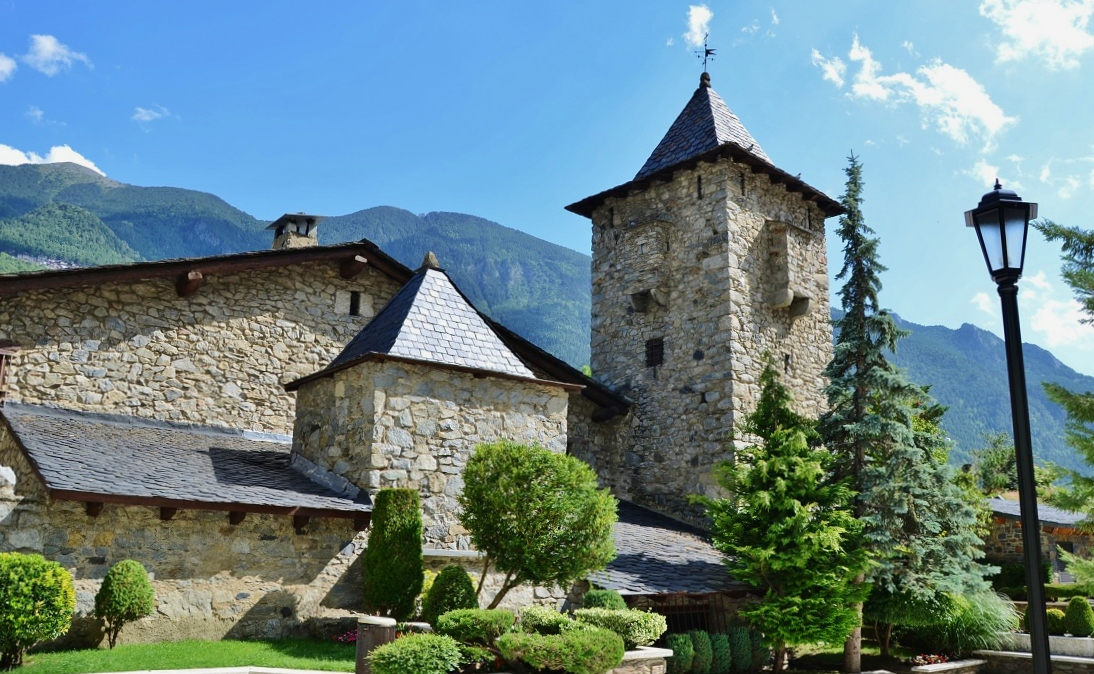 Casa de la Vall